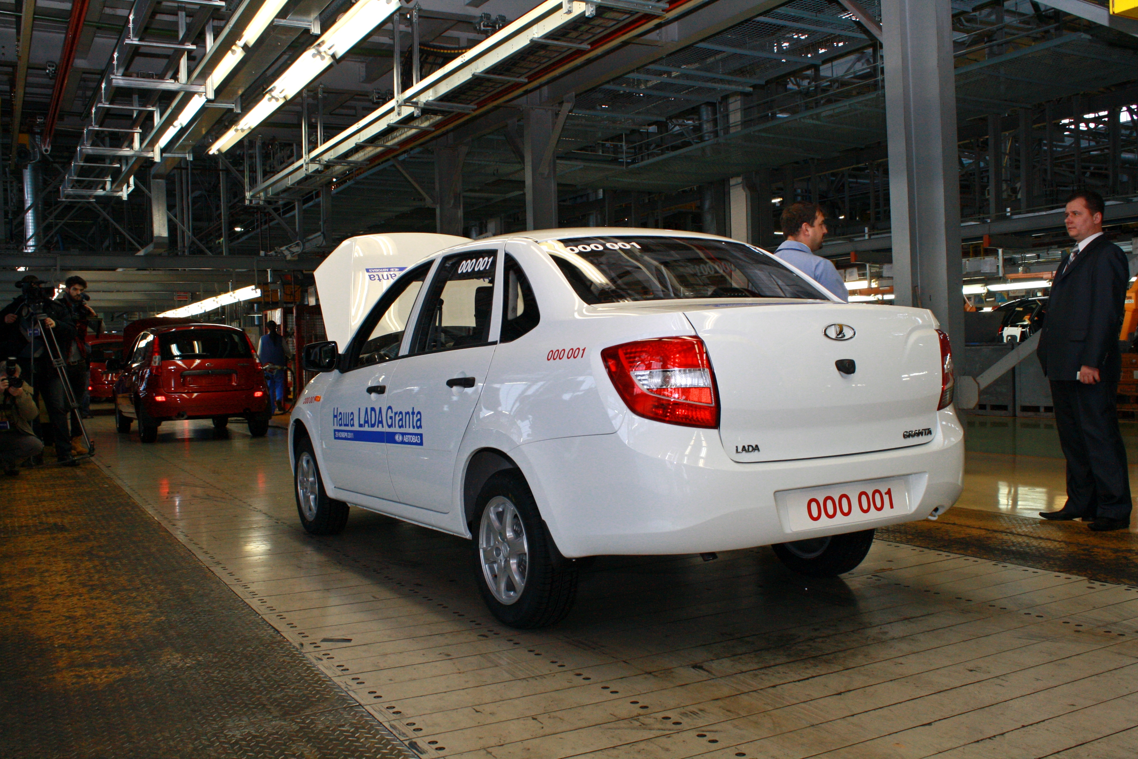 Первая серийная Lada Granta на конвейере АвтоВАЗа, вид сзади